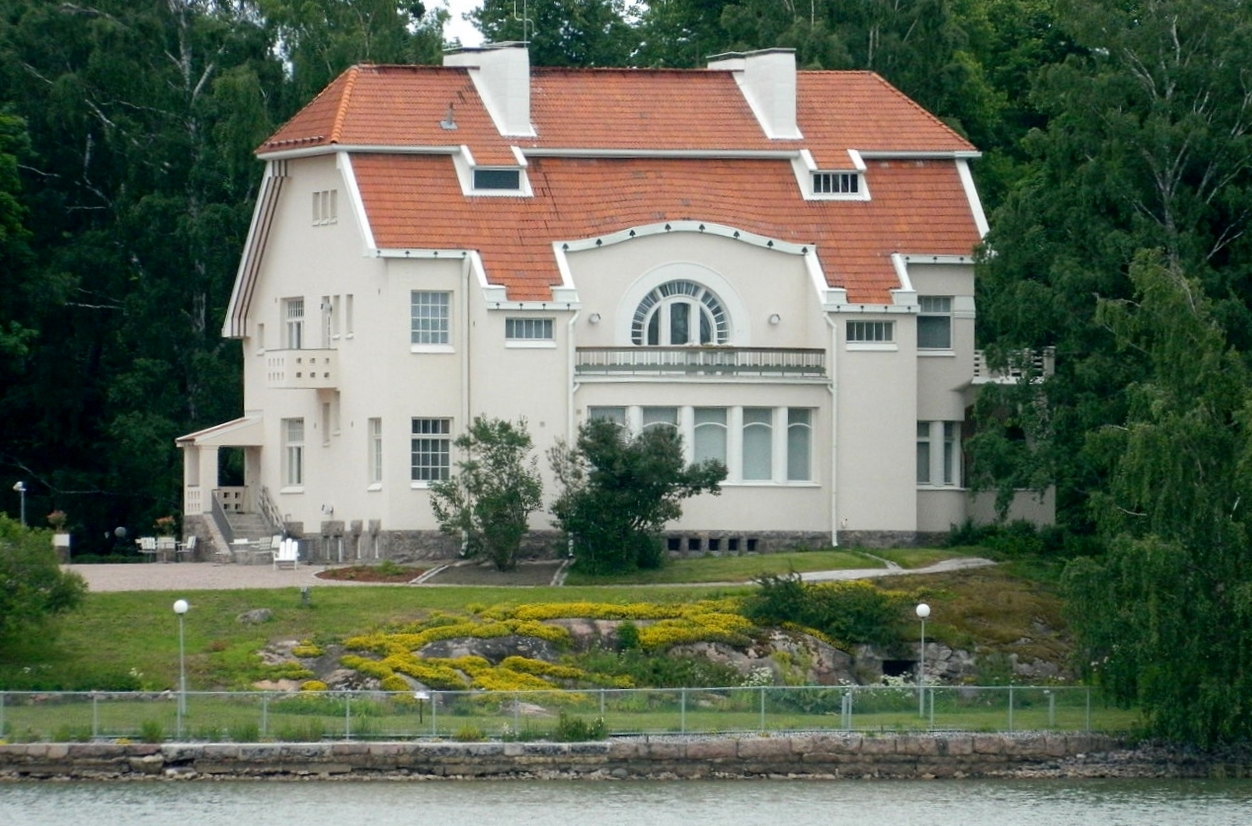 Tamminiemen huvila Helsingin Meilahdessa. Kuva otettu 19. kesäkuuta, 2013